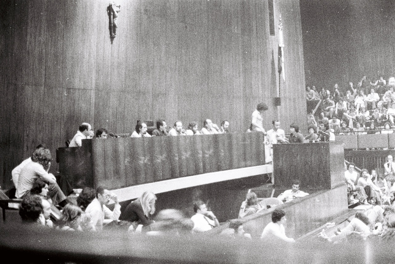 Evento da semana de debates culturais e de repúdio à ditadura militar na Assembleia Legislativa do Rio Grande do Sul. Na mesa, da esquerda para a direita: Porfírio Peixoto, Rogério Mendelski, André Forster, Pedro Simon, Raimundo Pereira, Edgar Vasquez e Zuenir Ventura. O último integrante da mesa não foi identificado.